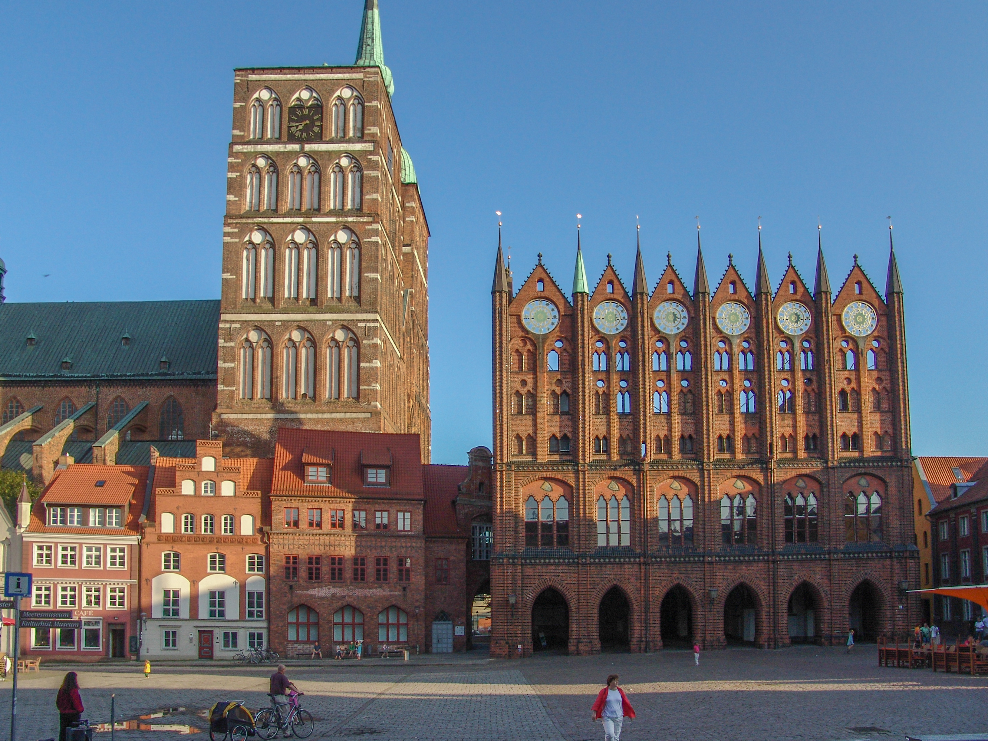 St. Nikolai und Rathaus in Strlasund